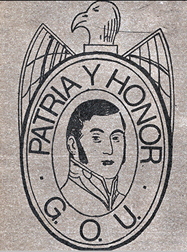 Escudo de la primera época de la logia G.O.U